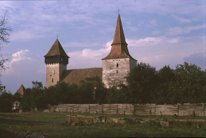 Kirchenburg Hundertbücheln (Movile RO) (1993)